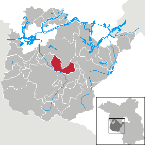 Planebruch in Brandenburg (Country) - District Potsdam-Mittelmark